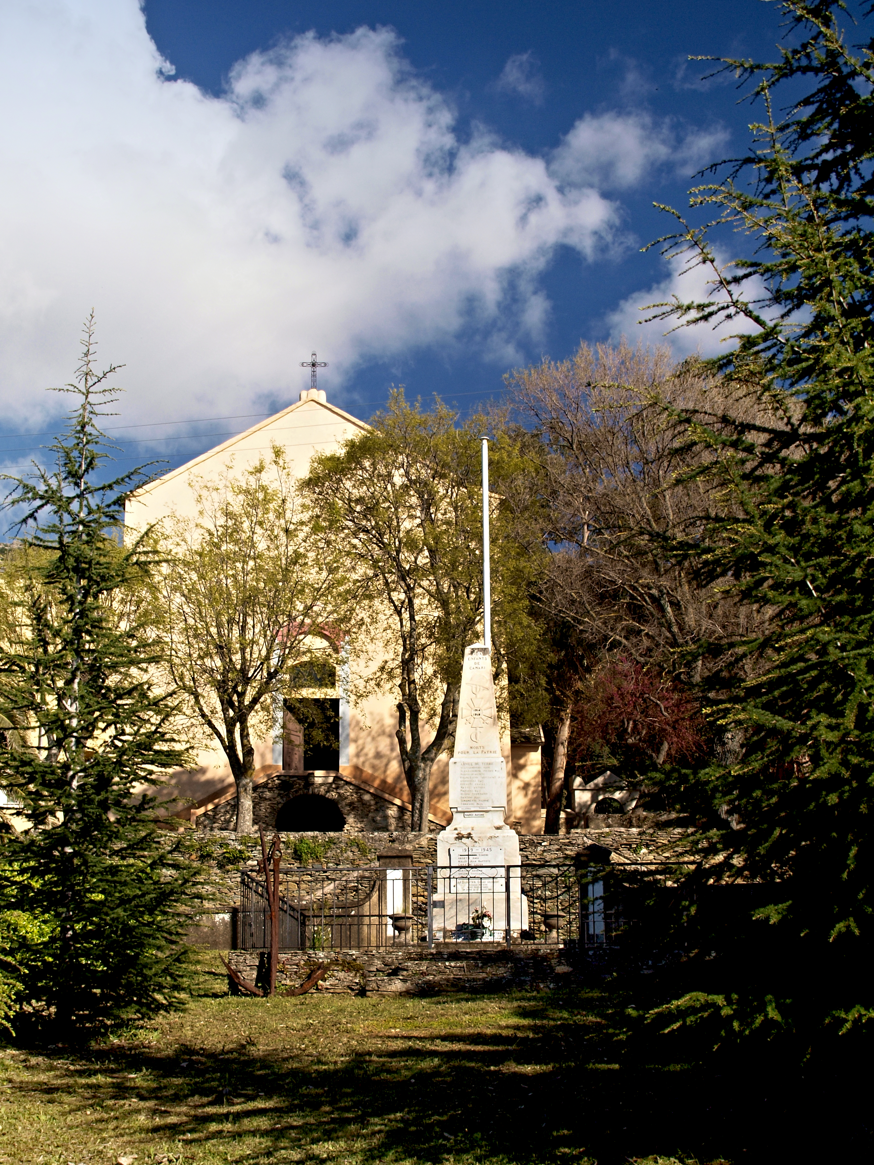 Canari (Corsica) - Chapelle de confrérie Santa Croce et monument aux morts à Pieve